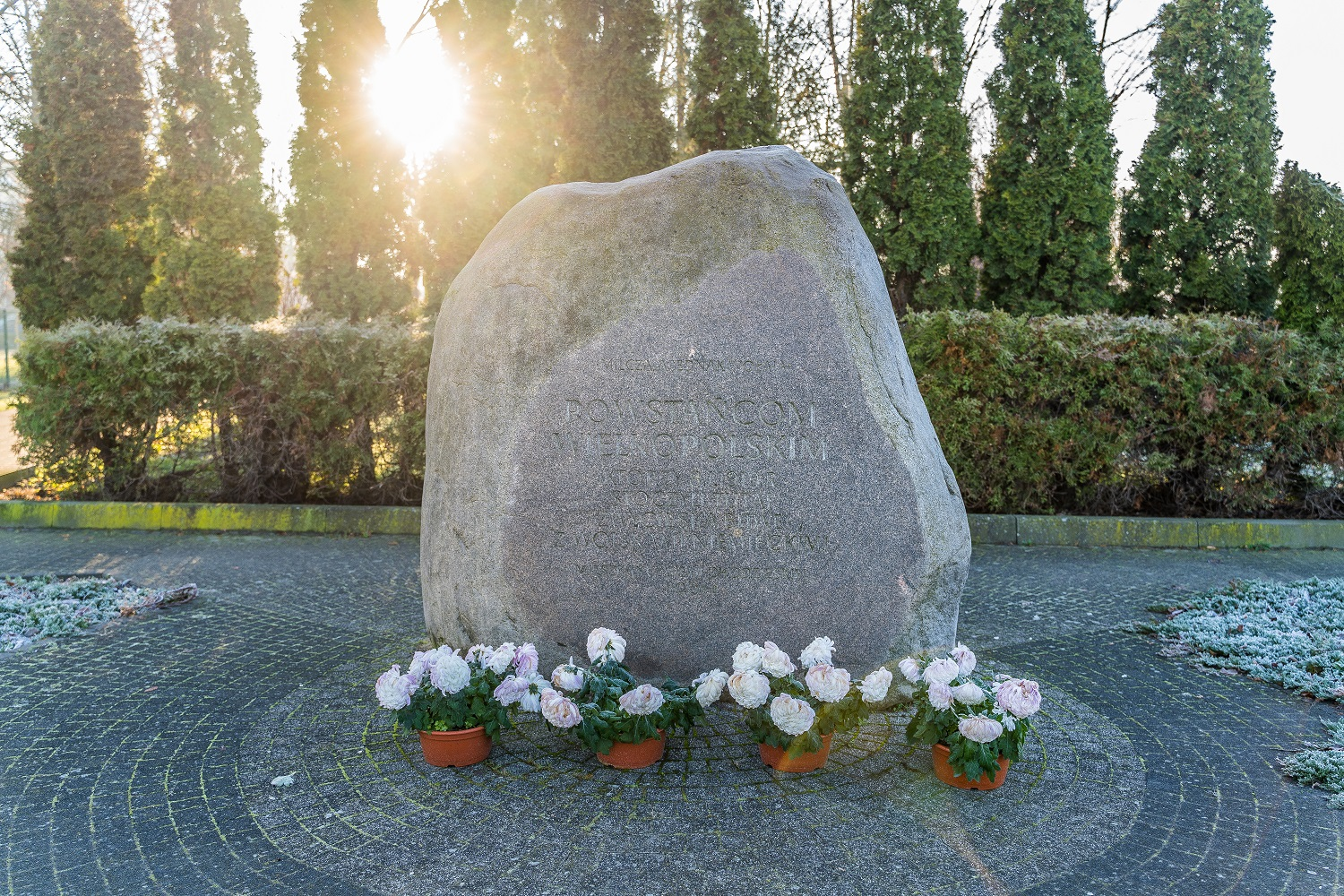 Pomnik pamięci Powstańców Wielkopolskich w Chodzieży